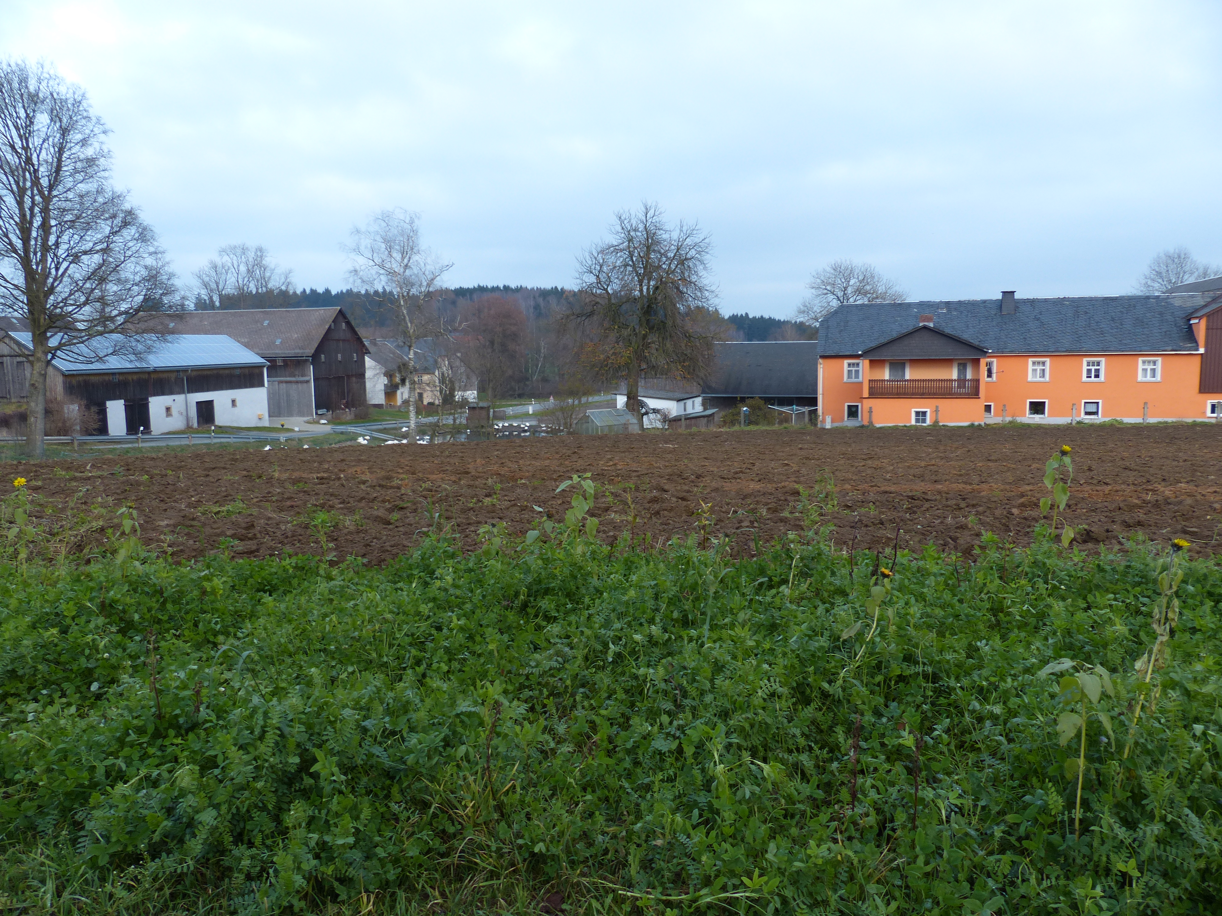 Ortsansicht